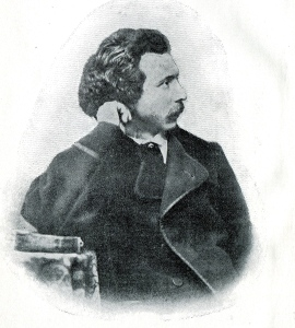 Otto Hausmann (1837–1916), deutscher Mundartschriftsteller und Publizist